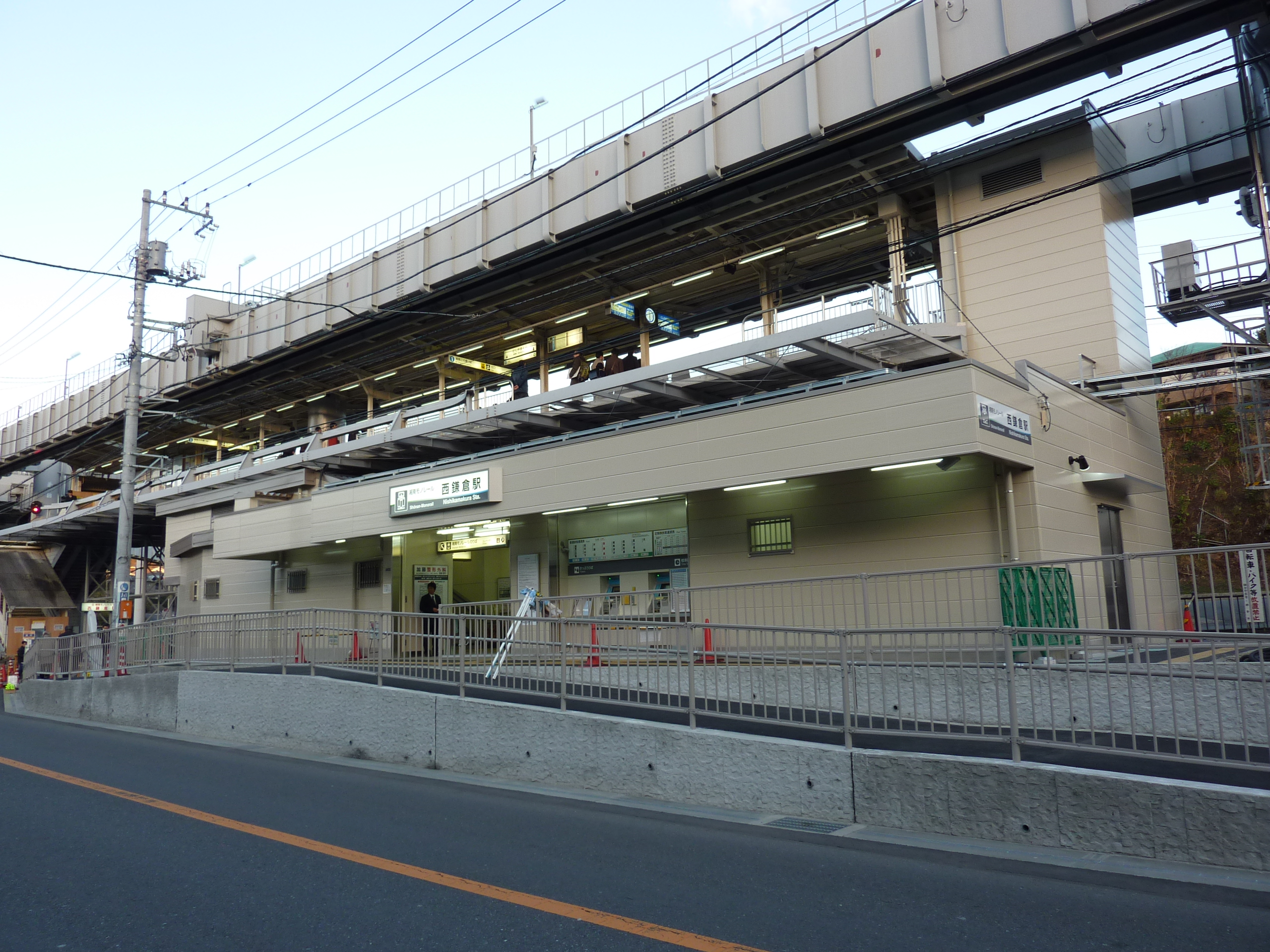 西鎌倉新駅舎（2011年3月3日撮影）